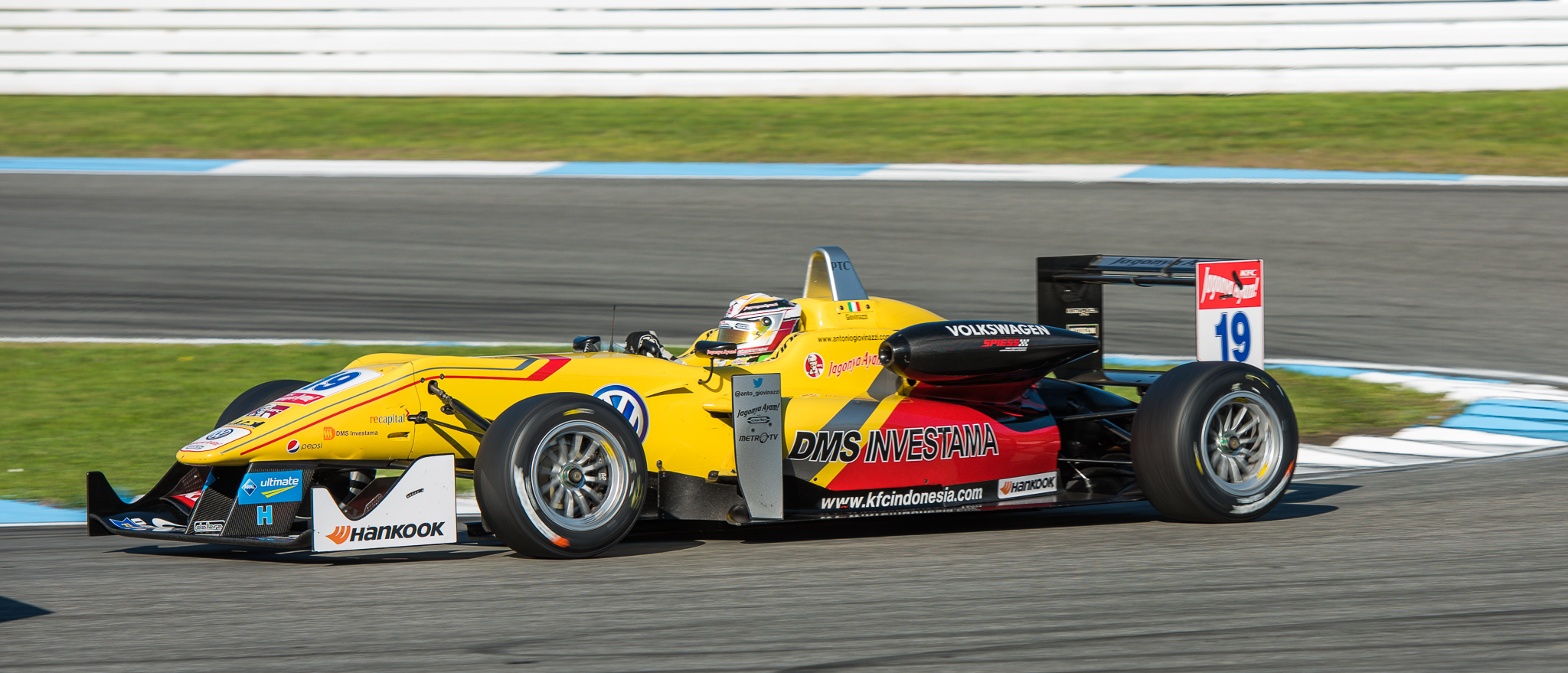 Antonio Giovinazzi,DTM,Dallara F312,Deutsche Tourenwagen Masters,F3 FIA European Championship,FIA Formel 3 Europameisterschaft,Hockenheimring,Jagonya Ayam with Carlin,Motorsport,Volkswagen